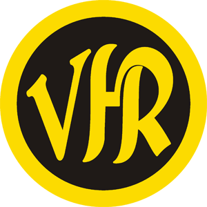 Wappen des VfR Lübeck